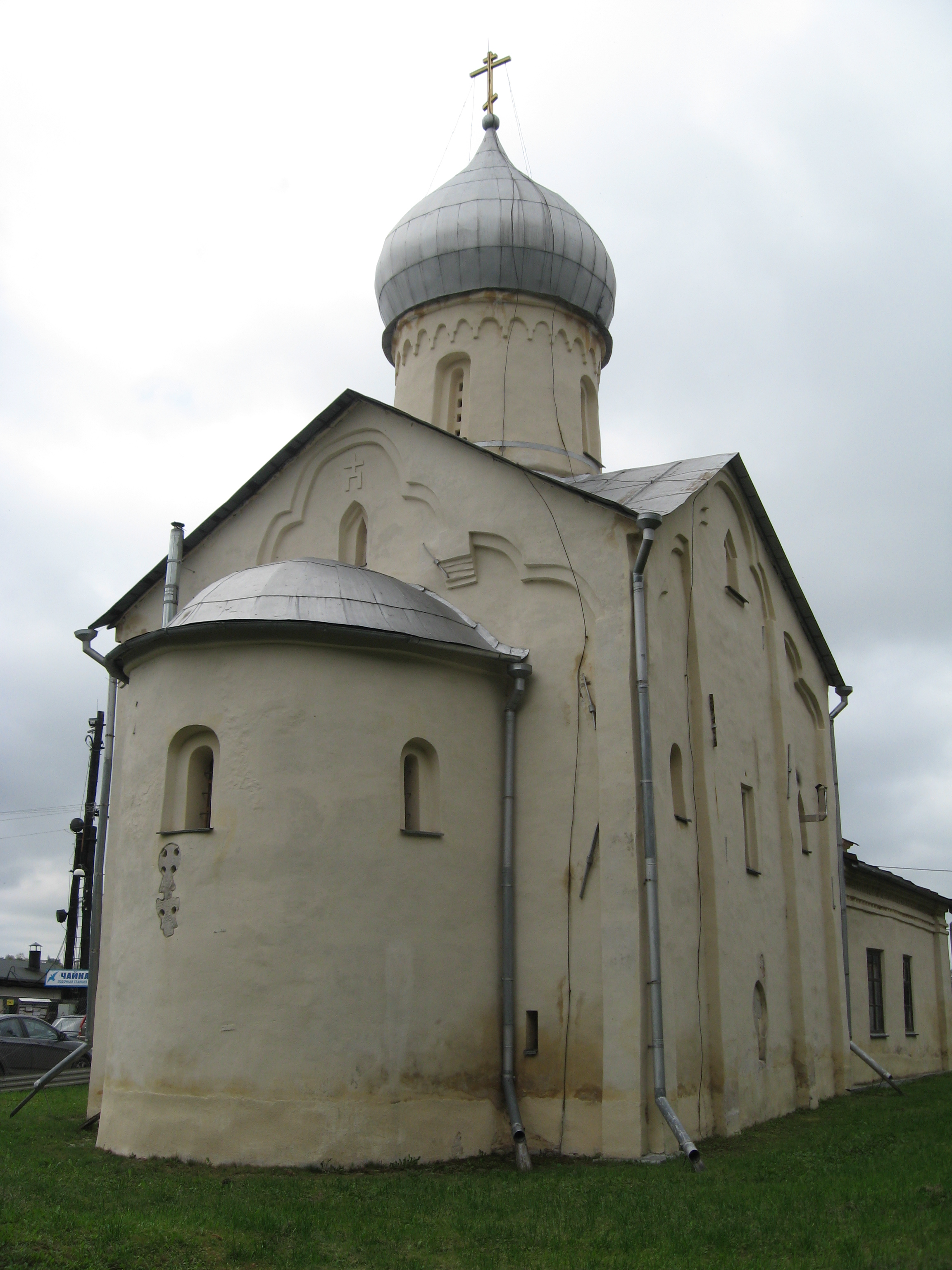 Церковь Иоанна Богослова на Витке в Великом Новгороде